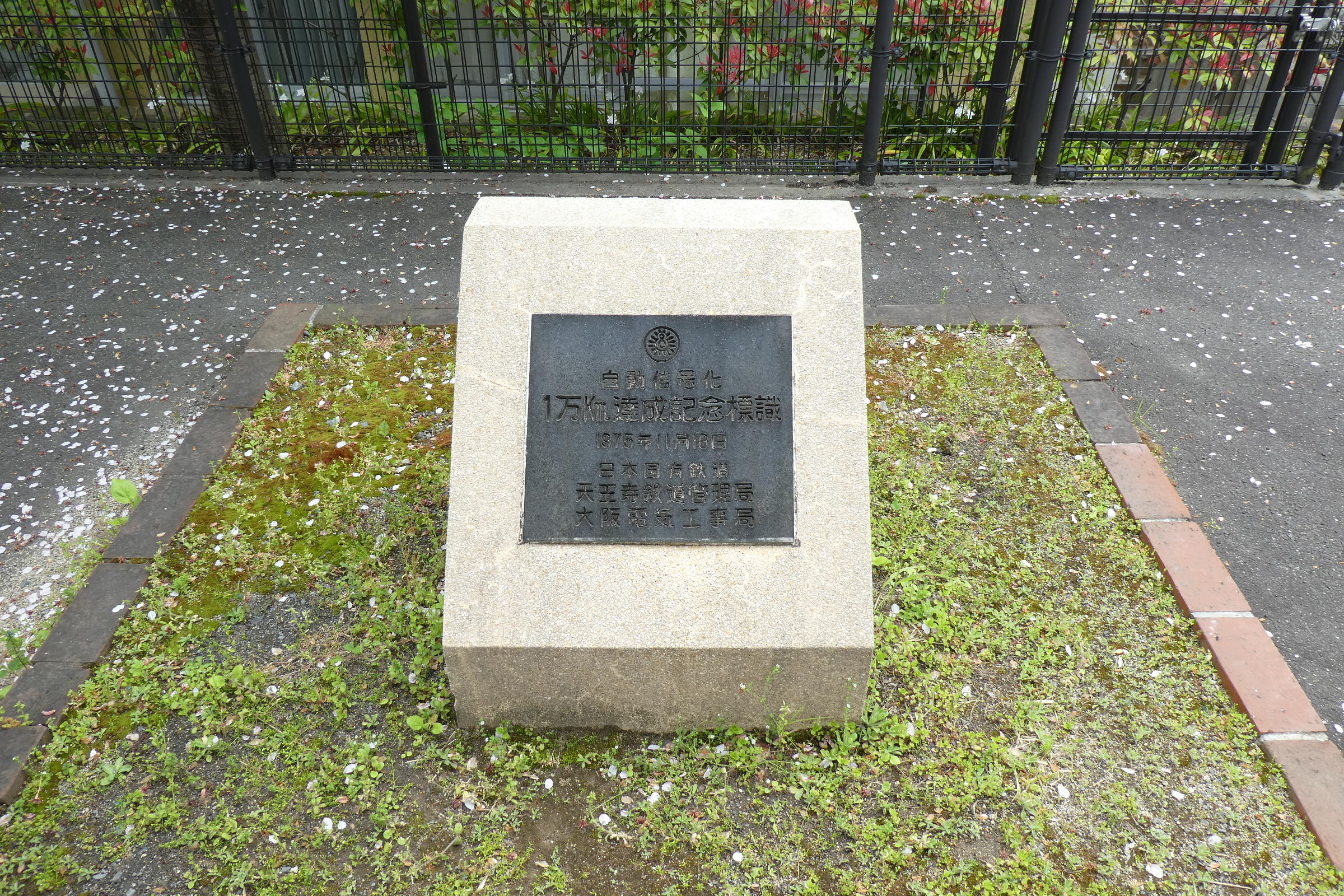 JR桃山駅1番のりばに設置されている国鉄 自動信号化1万km達成碑。